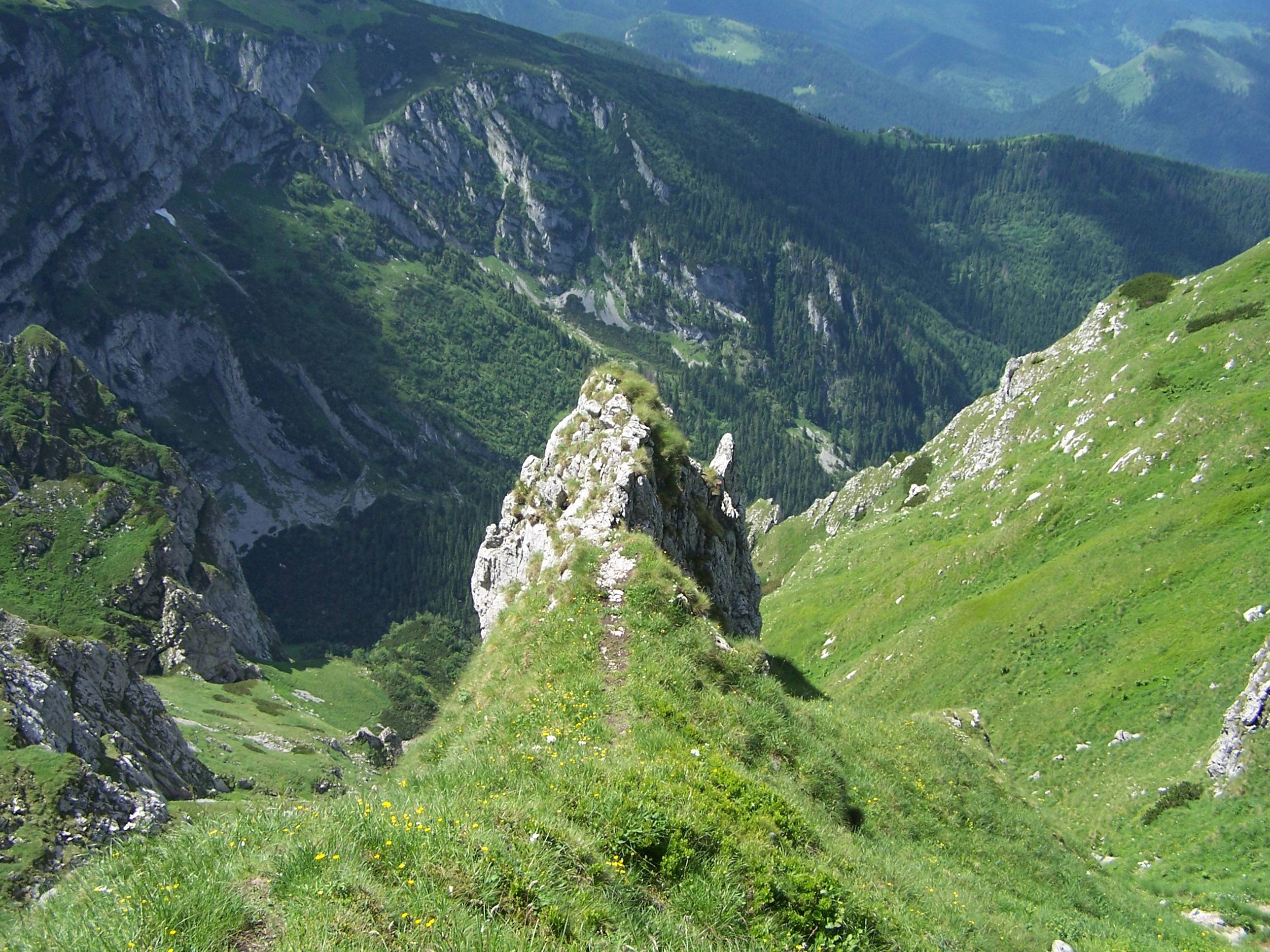 Kobylarzowy Żleb (Tatra Mountains, Czerwone Wierchy)